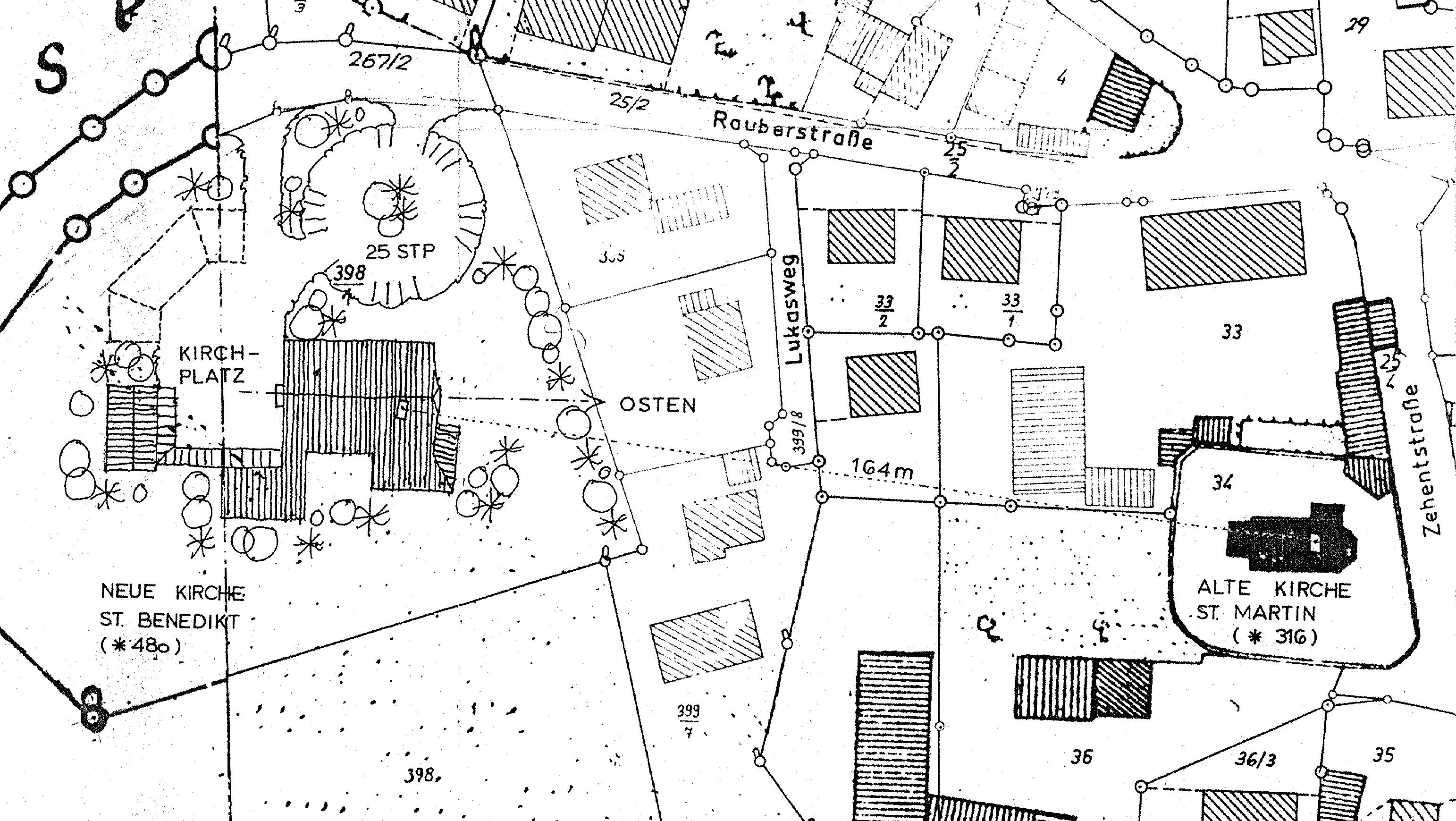 Dieses Bild zeigt die Herleitung der Positionierung im Grundstück von St. Benedikt in Oberisling